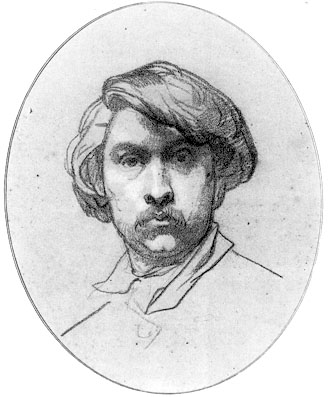 Autoritratto, gessetto bianco e nero, Musée des Beaux-Arts, Nancy, France